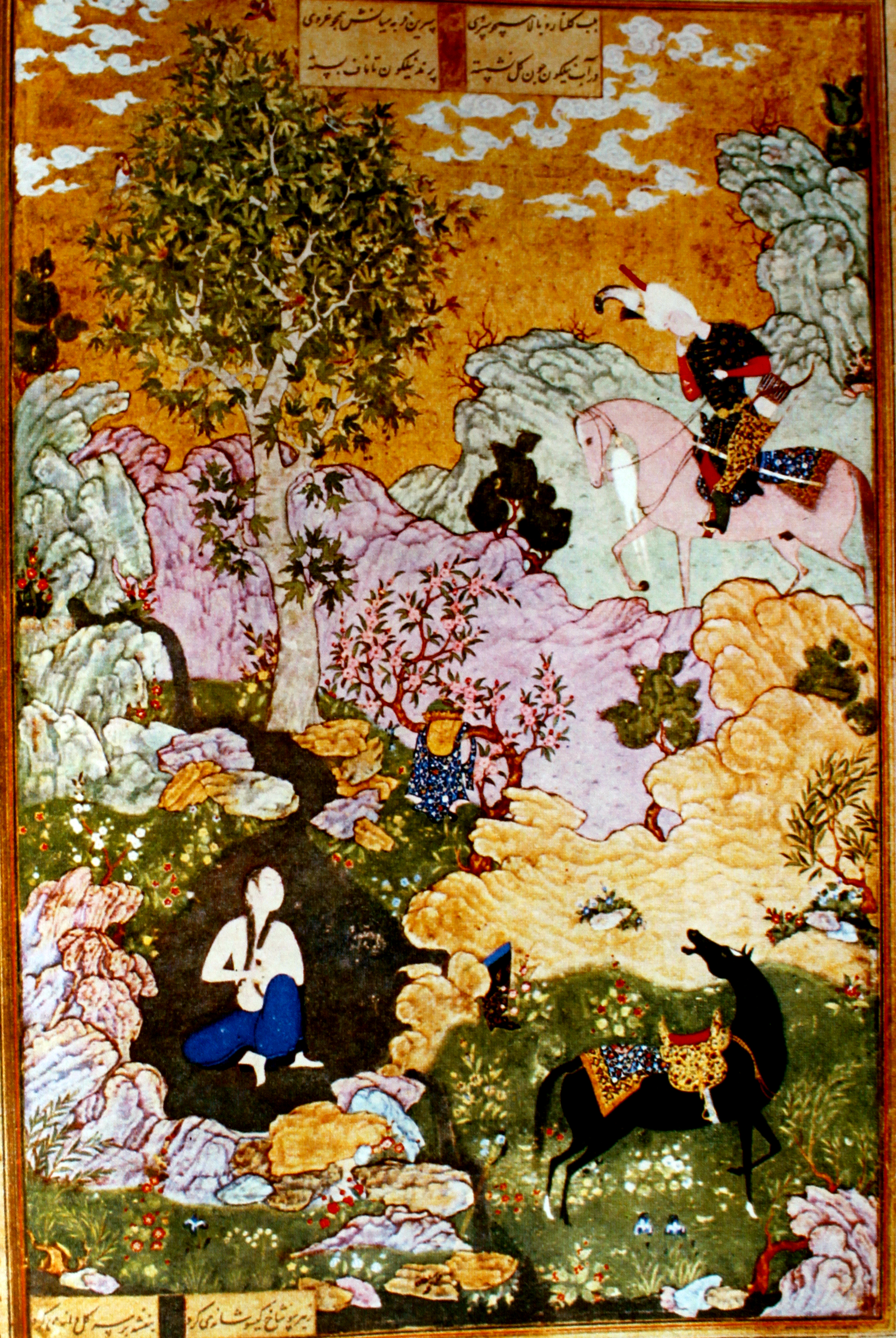 Sultan Məhəmməd-Xosrovun çimən Şirini görməsi, 1539-1543, Təbriz miniatür məktəbi